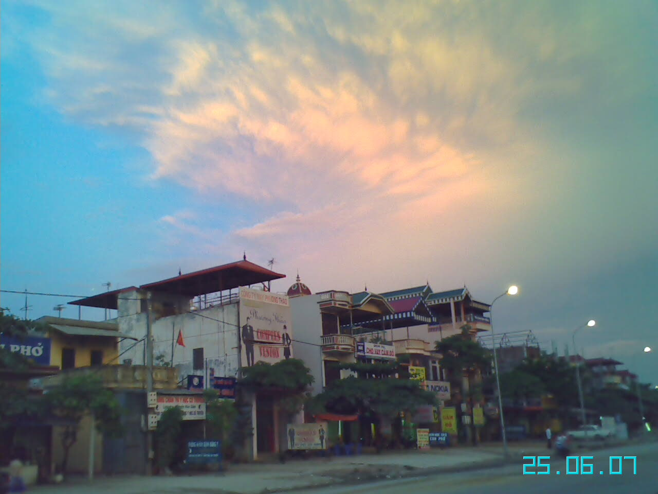 Một góc thị trấn Xuân Mai trên đường 21